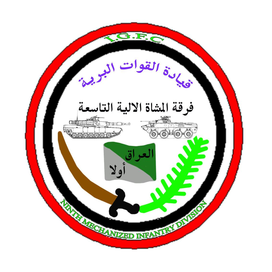 شعار الفرقة التاسعة مشاة الي العراقية